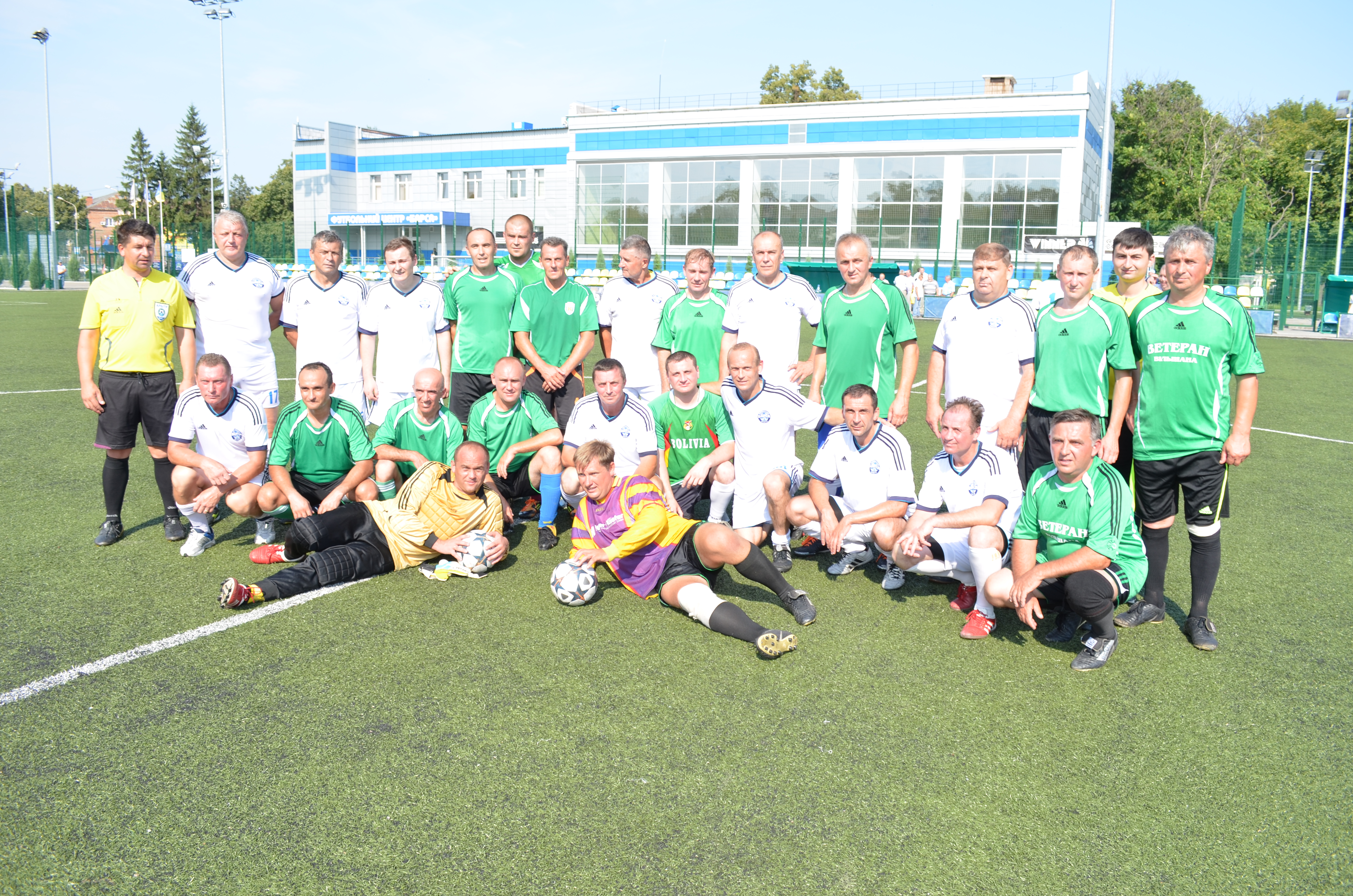 Товариський зустріч з футболу "Збірна земляків (Суми) - Ветеран (Недригайлів)"